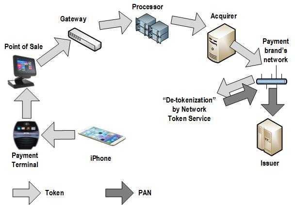 Монгол: security